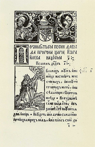 Скарына. "Псалтыр", 6 жніўня 1517 г. (Ліст 5). Гравюра, з якой пачынаецца тэкст "Псалтыра".